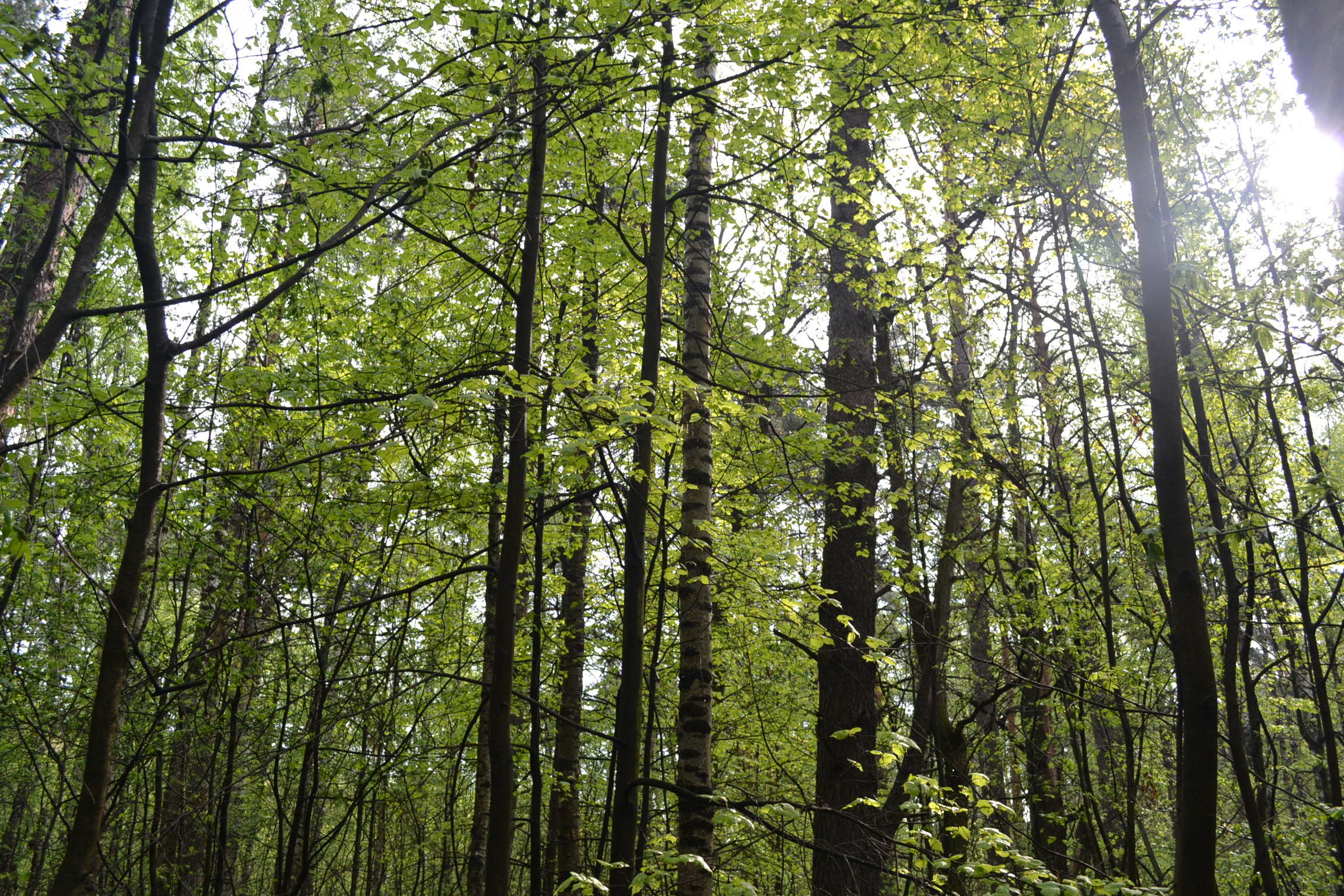 Весна